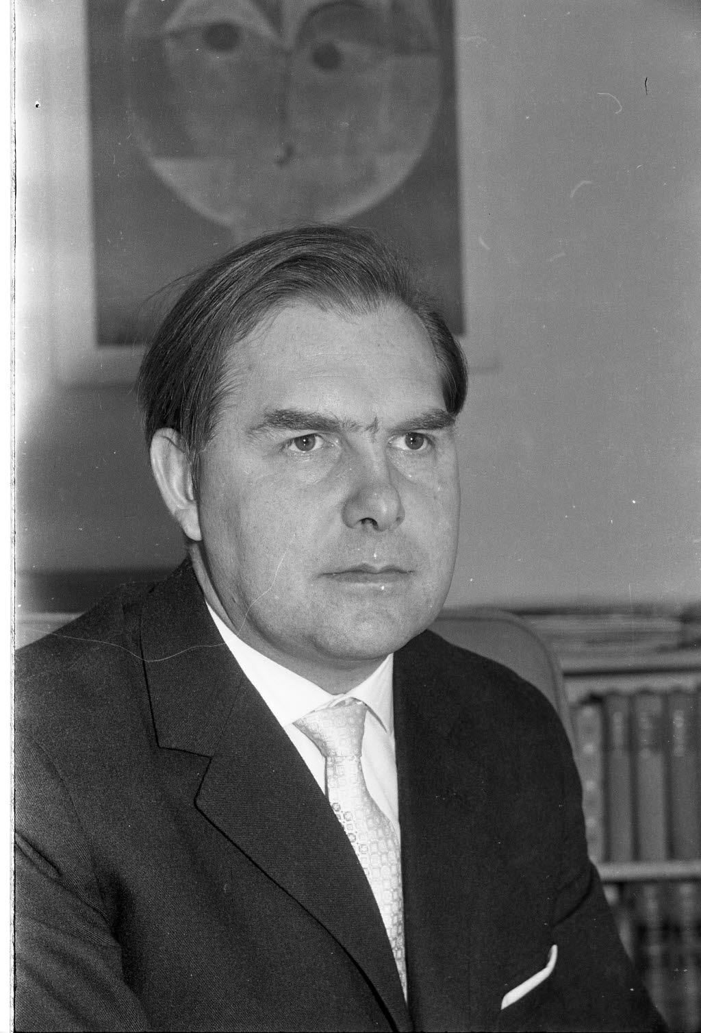 Professor für Germanistik im Germanistischen Seminar an der Philosophischen Fakultät der Christian-Albrechts-Universität (CAU).